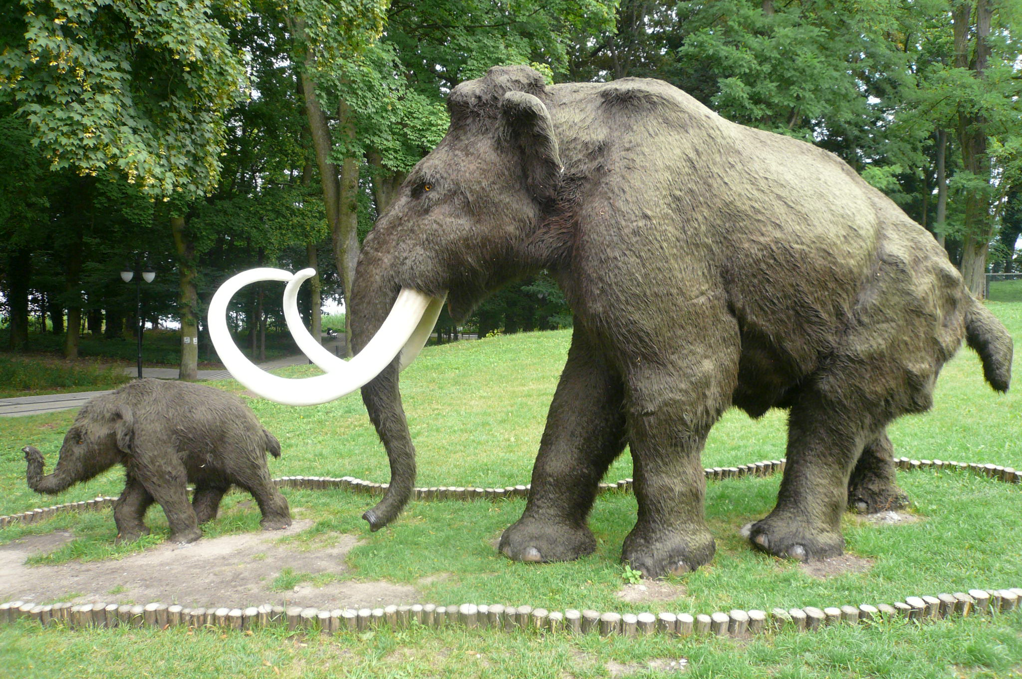 Krowa mamuta włochatego z cielęciem - figury z "Alei Gwiazd Plejstocenu" w Moryniu. Nazywane są one Geosią i Morynkiem